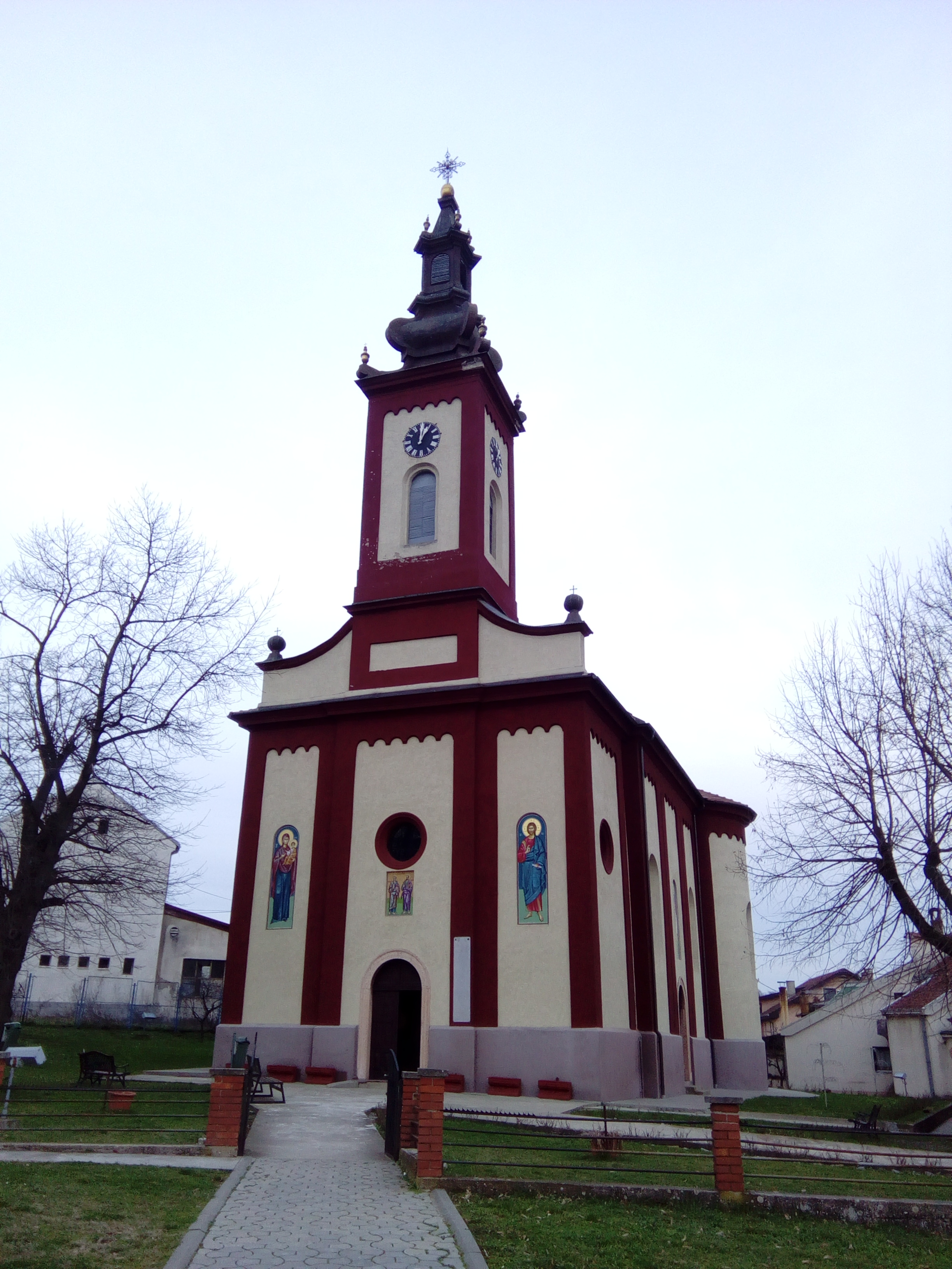 Srpski (latinica): Crkva u Rači